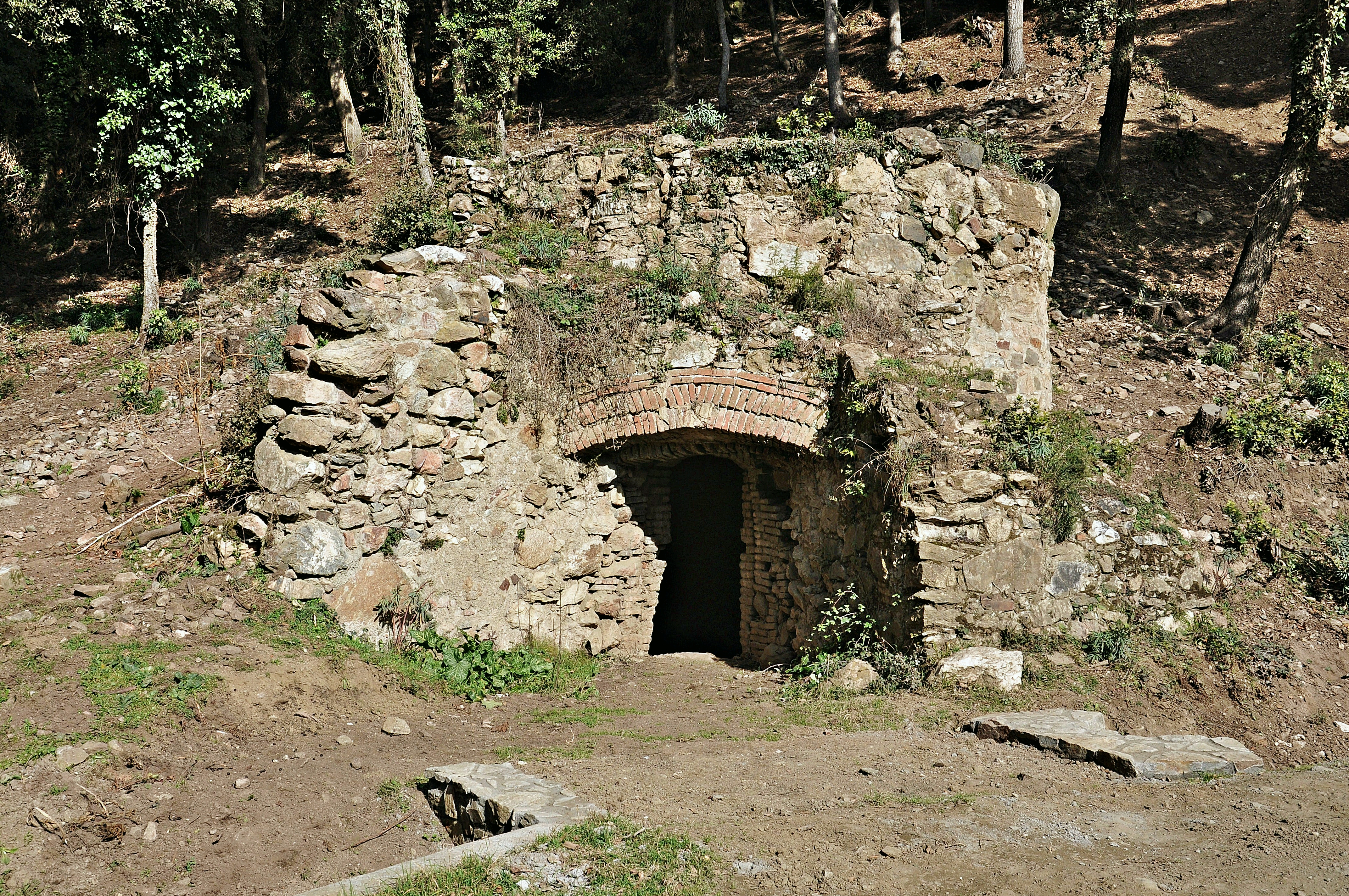 tordera-maresme-cataluña